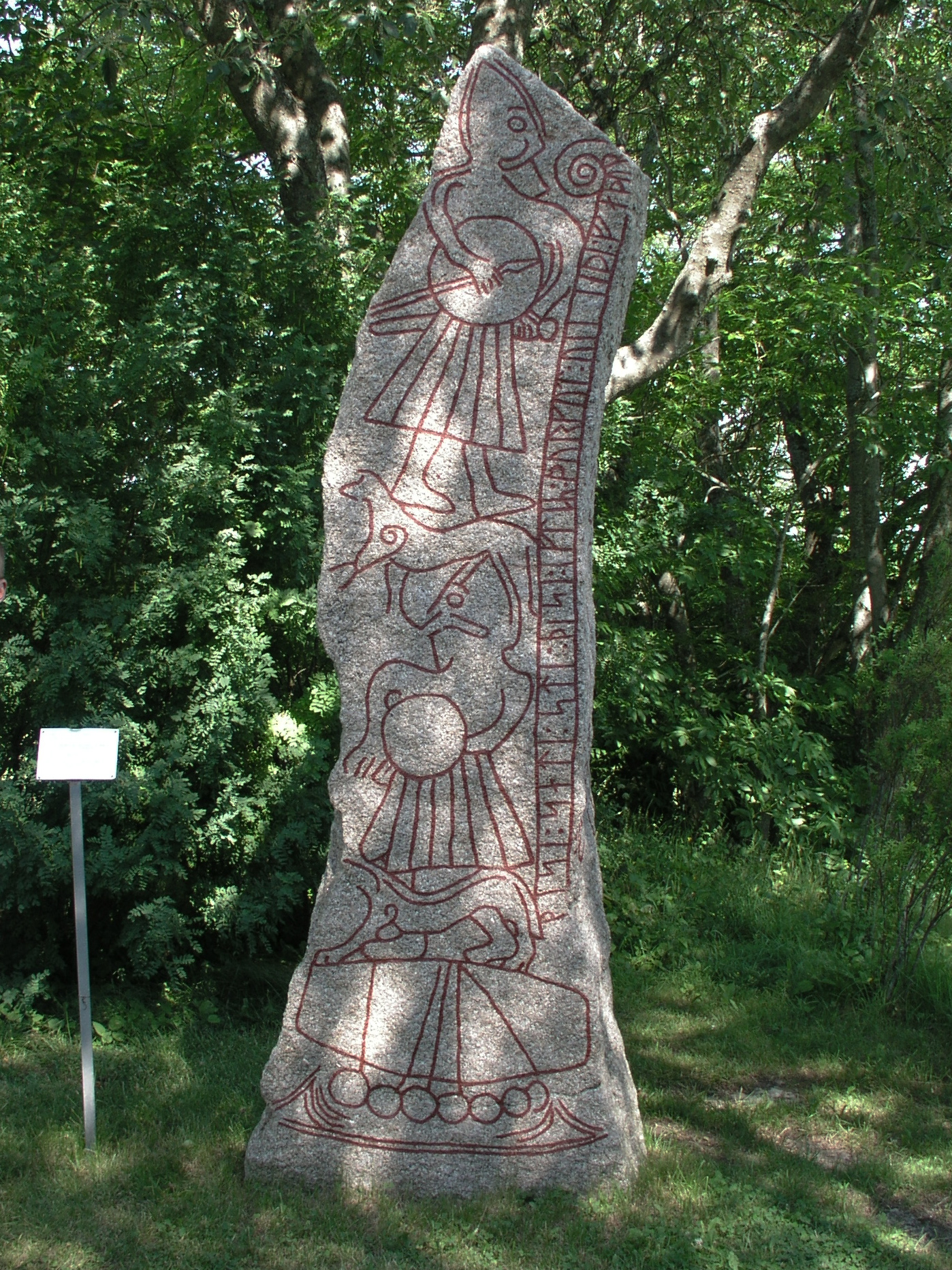 Ledbergs kyrka / Ledberg church. Runic stone. ÖG 181 framsida.